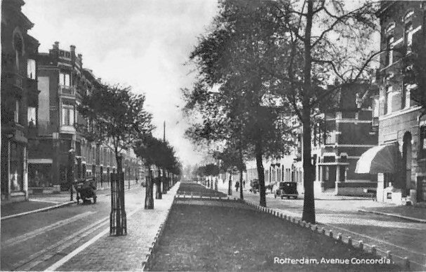 De Avenue Concordia in Rotterdam. Foto van prentbriefkaart uit 1932, fotograaf onbekend.